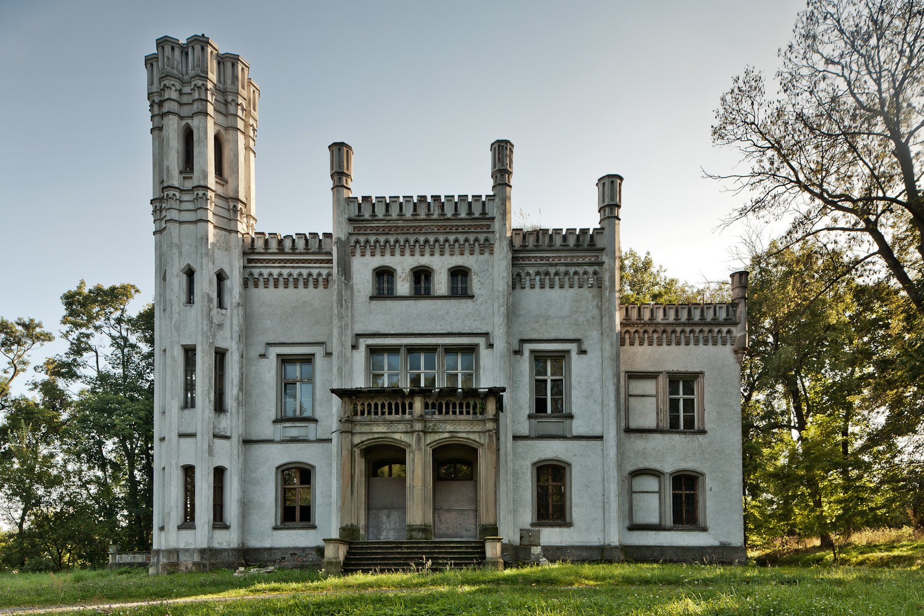 Zespół pałacowy, Piekary - widok na pałac